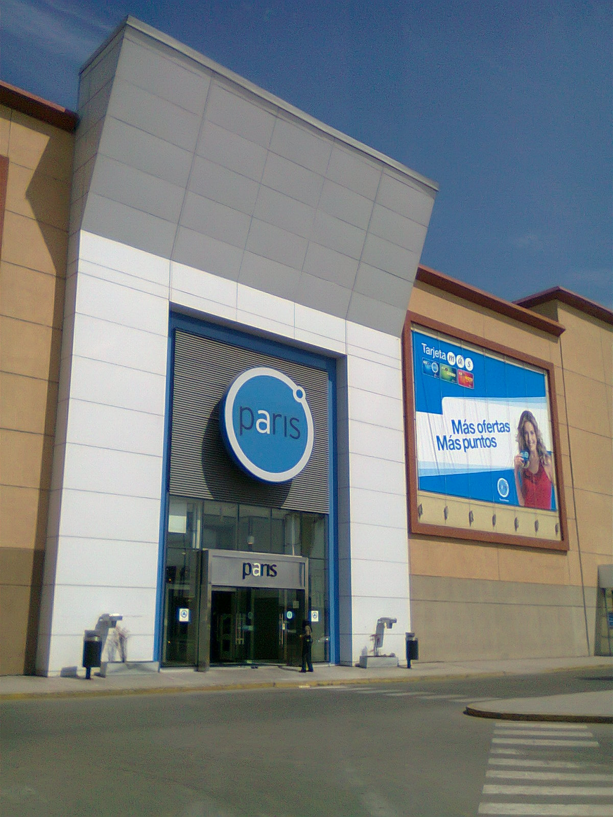 La entrada posterior a la tienda París ubicada en el centro comercial Mall Arauco Maipú. 23 de septiembre de 2011.